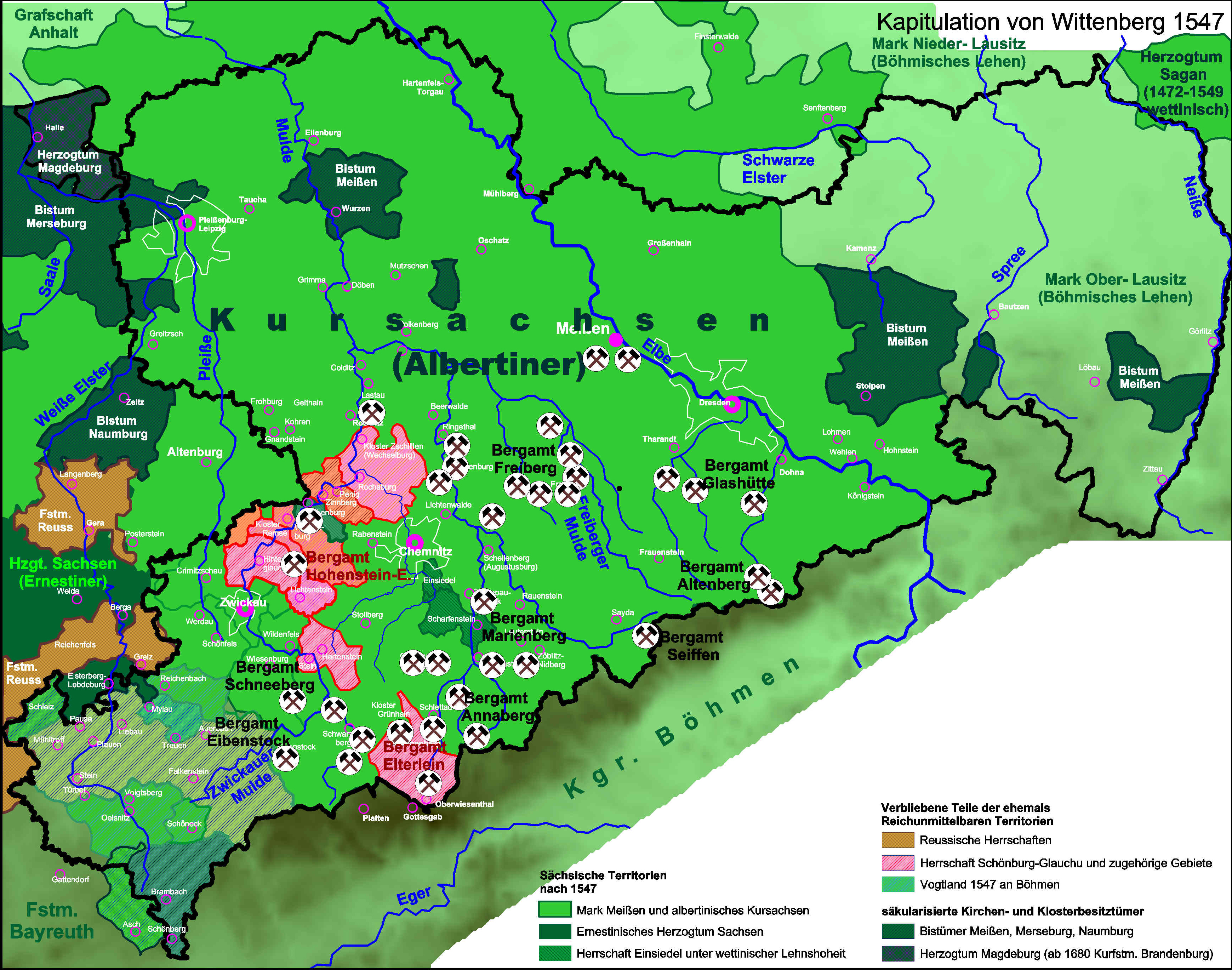 Verbliebene reichsunmittelbare Fürstentümer in der zweiten Hälfte des 16.Jhdts. im heutigen Sachsen und Ostthüringen . (Digitalisierung aus verschiedenen Quellen)